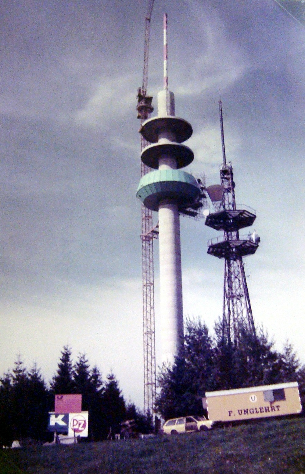 Neubau des Sender Blender (Kempten)